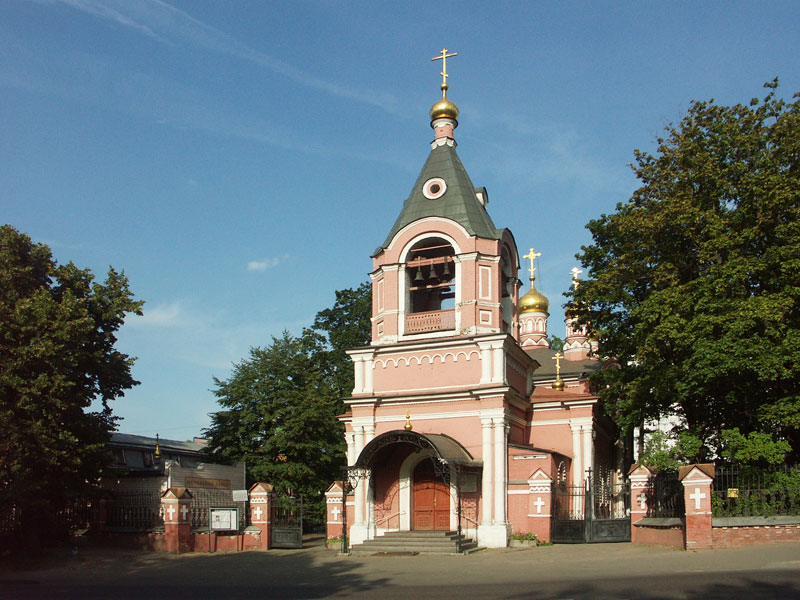 Храм Рождества Пресвятой Богородицы